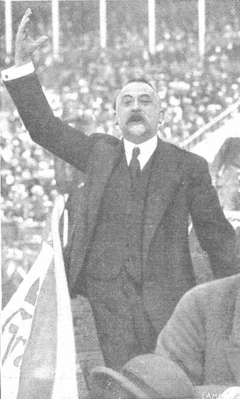 Los oradores, perorando.